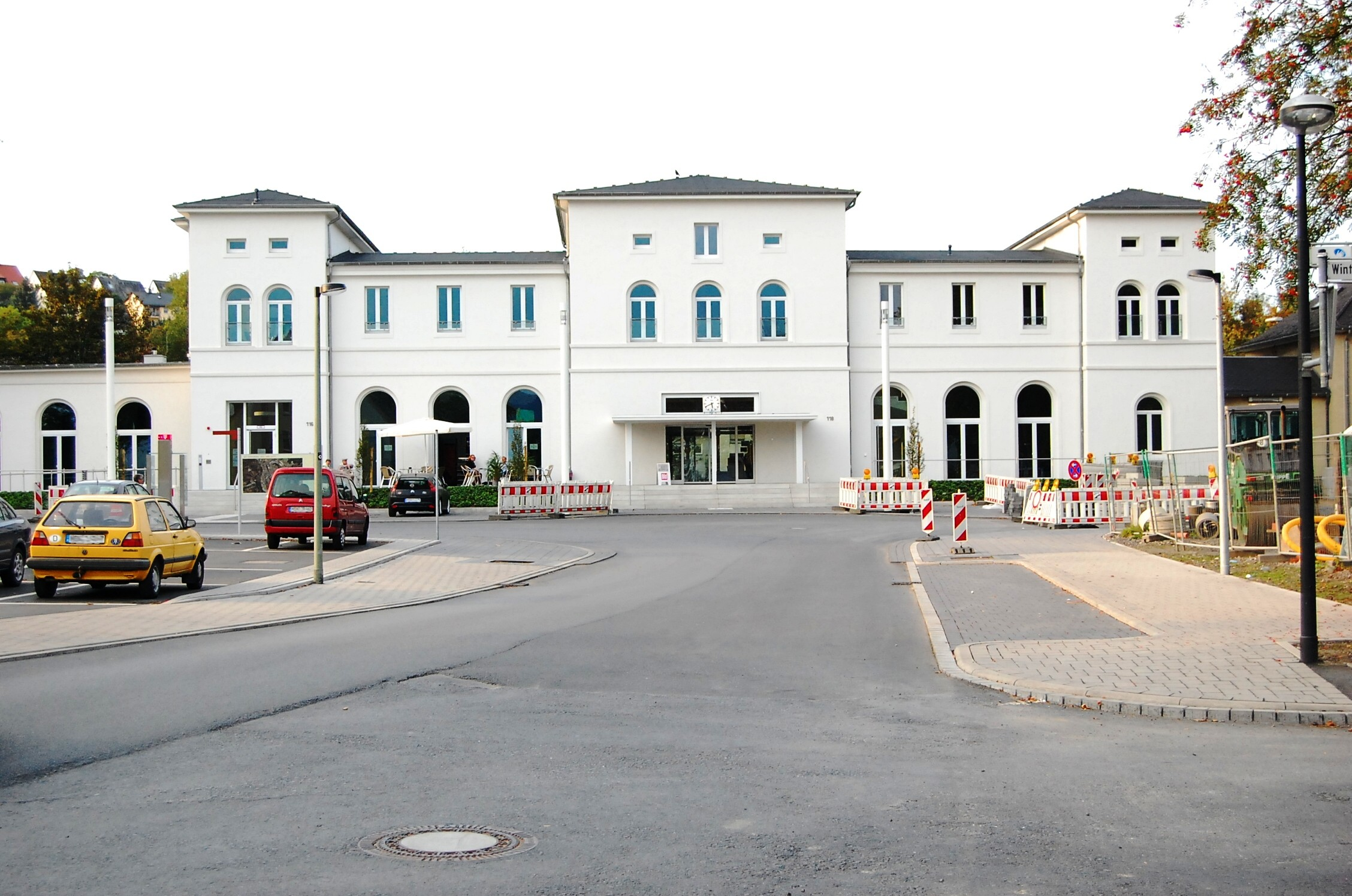 Renovierter Bahnhof in Arnsberg